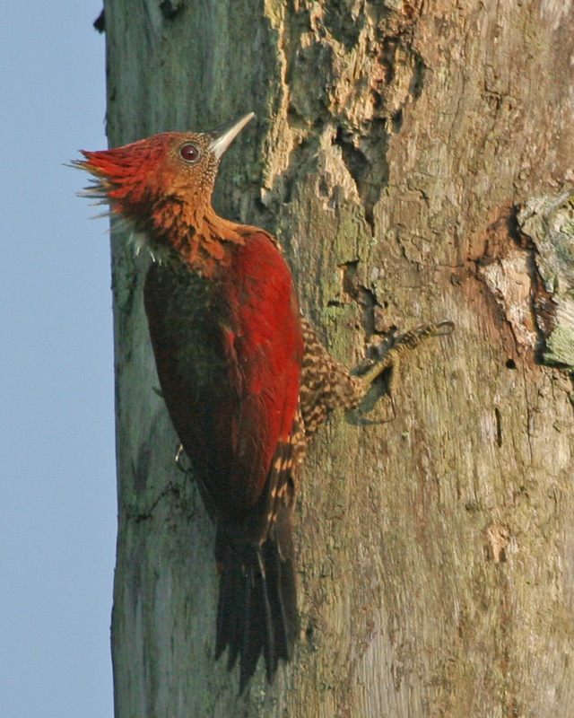 Banded Woodpecker Picus miniaceus malaccensis 31st. August 2005 Johor Bahru, Malaysia Malay: Belatuk, Belatuk Merah Indonesian: Caladi gunung bergaris Thai: นกหัวขวานแดงลาย Distribution: ssp